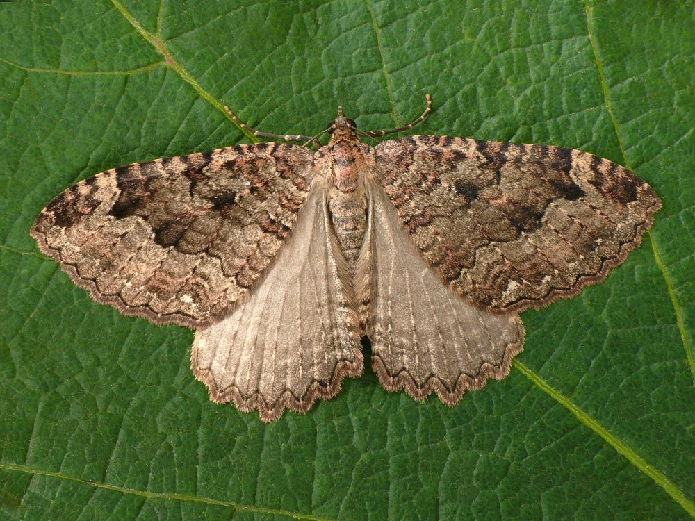 Triphosa dubitata Slovakia, Trenčín - Skalka nad Váhom